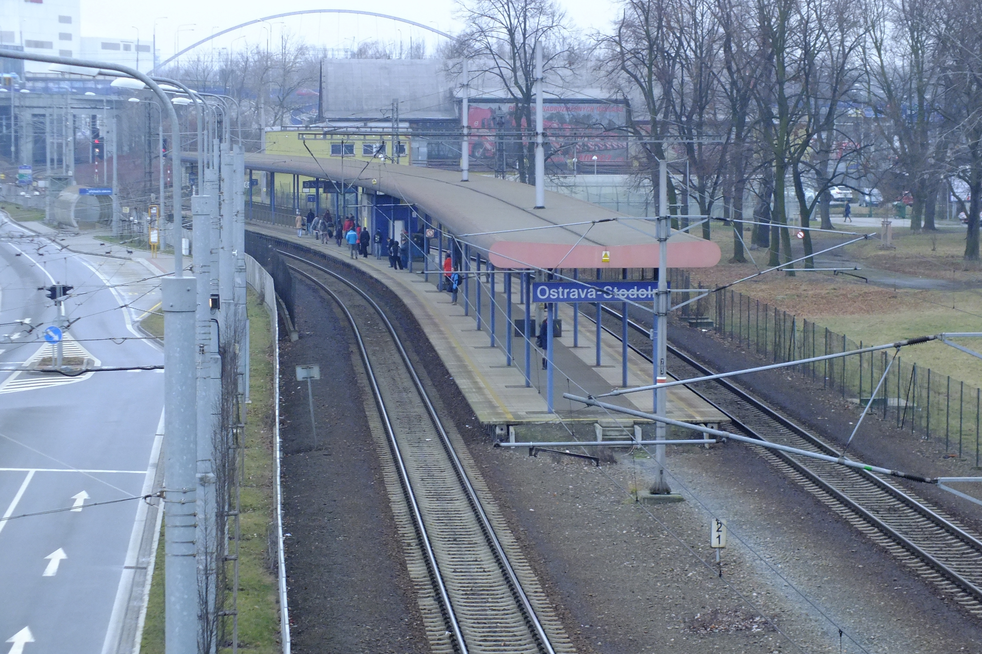 Železniční zastávka Ostrava-Stodolní